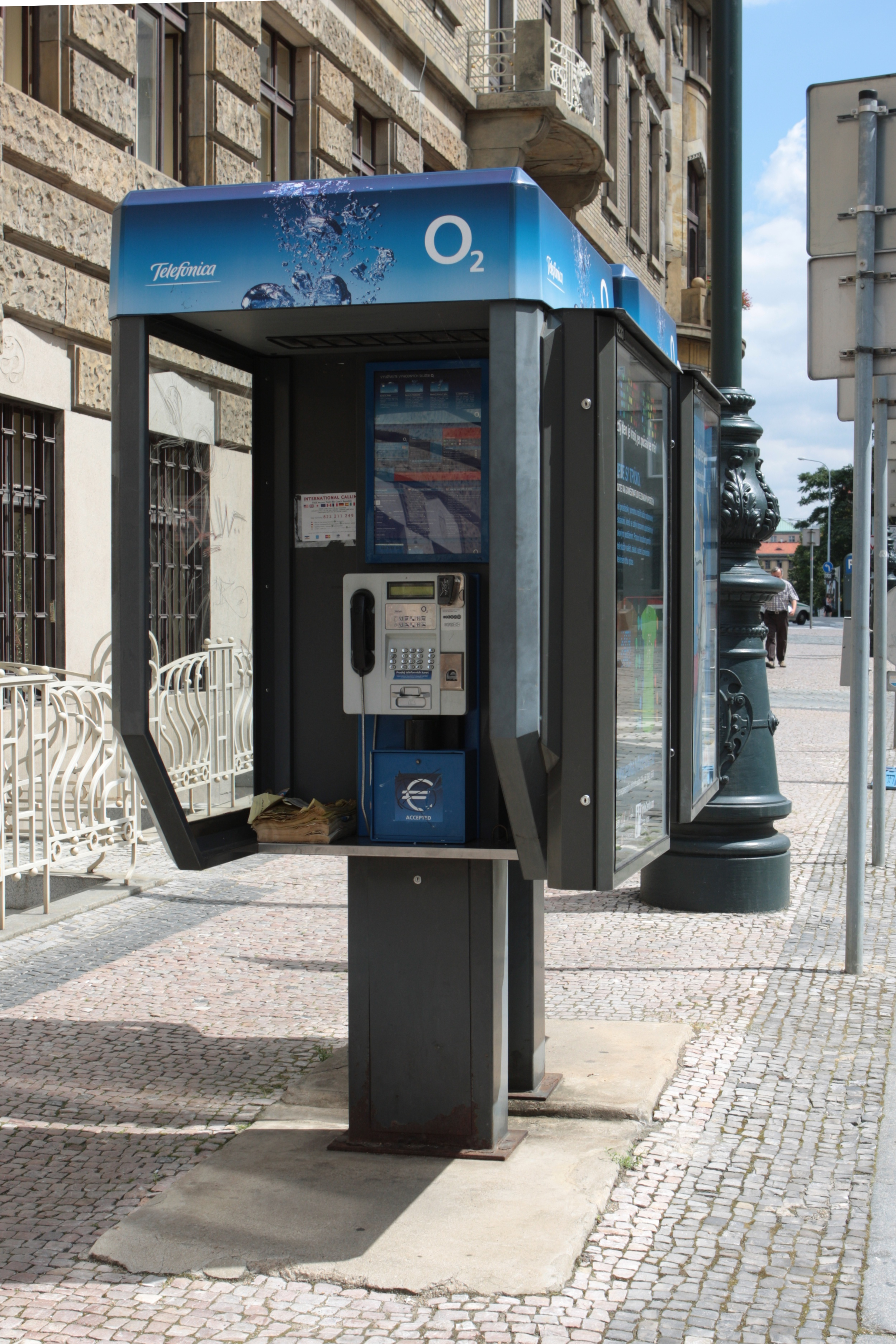 Telefonní budky v Praze v Řásnovce, za budovou ministerstva průmyslu a obchodu ČR. V dálce je vidět velmi slabě i budova Českých Drah